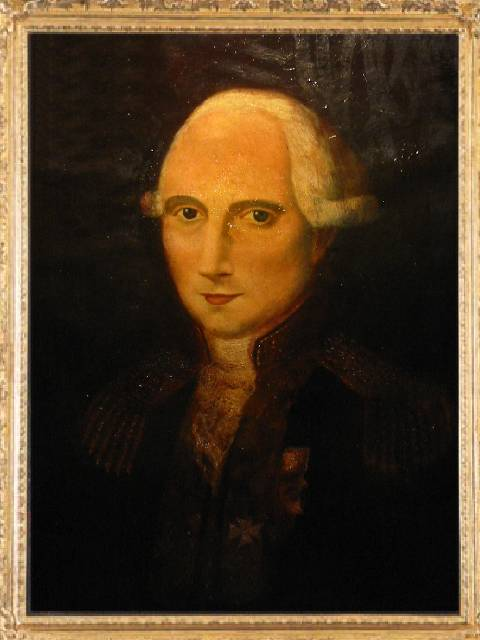 Paul François Ignace de Barlatier de Mas (b. 1739)